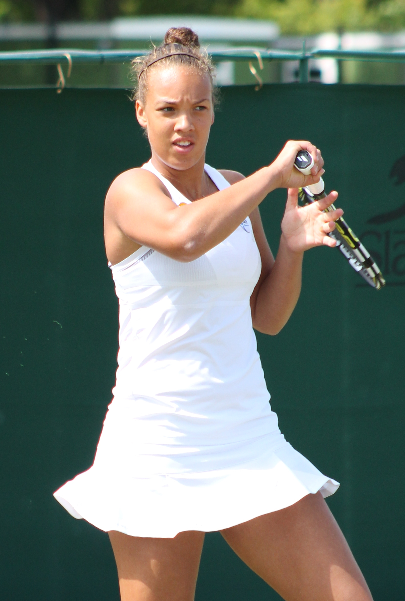 Freya Christie WMQ14 (2)